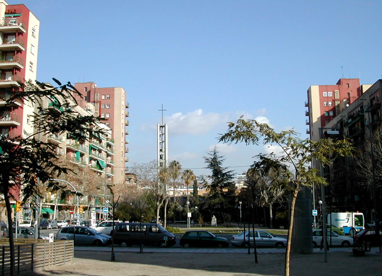 Autor: A.Guerrero Fecha: 13 enero 2006 Barrio del Congreso Eucarístico Distrito: San Andrés Ciudad: Barcelona